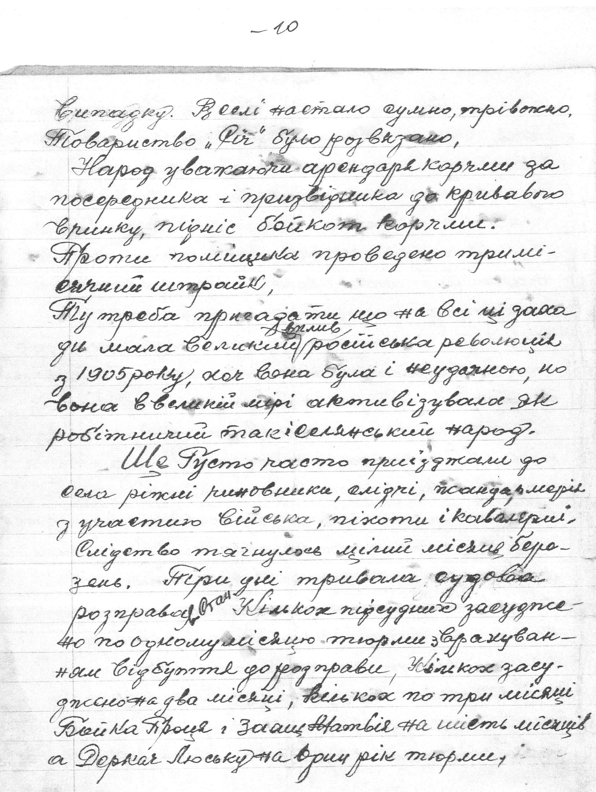 Копія рукопису